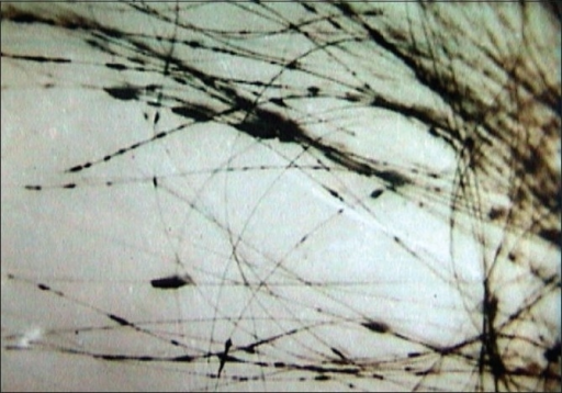 Nódulos de Piedra negra en el cabello infectado por el hongo Piedraia hortae.